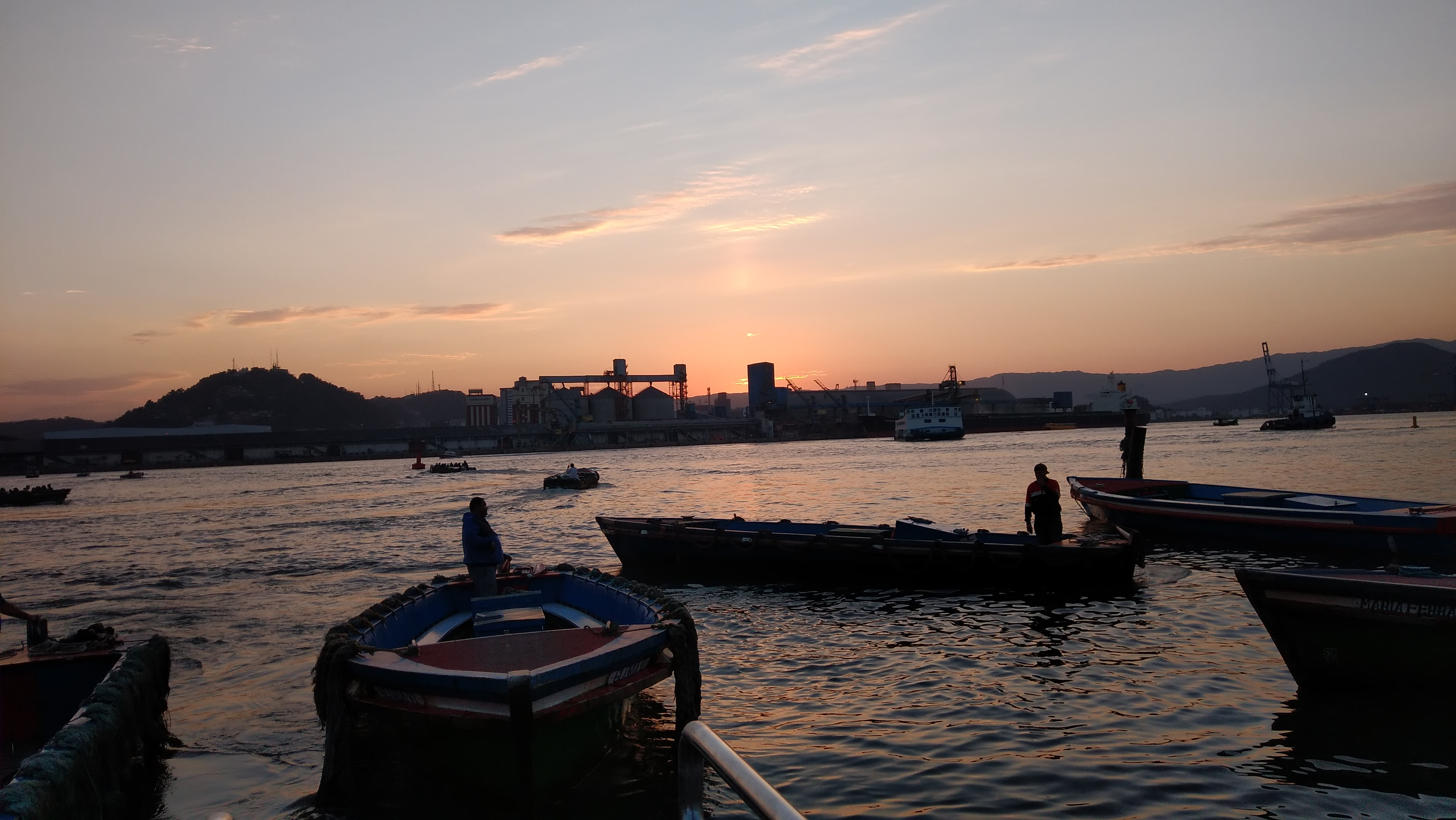 Travessia realizada por catraias entre Santos e Guarujá, com catraieiros